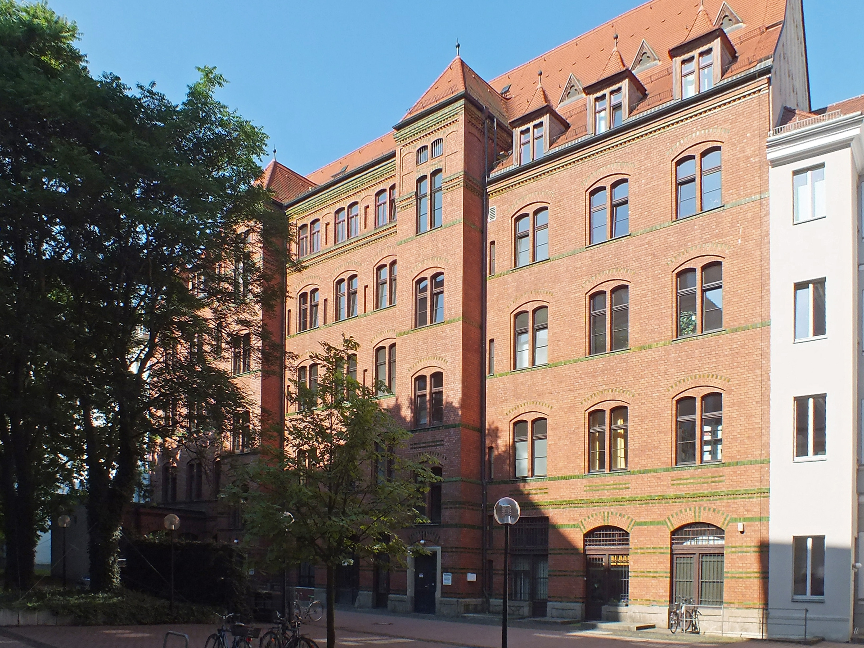 Hofseite des Roten Kollegs der Universität Leipzig